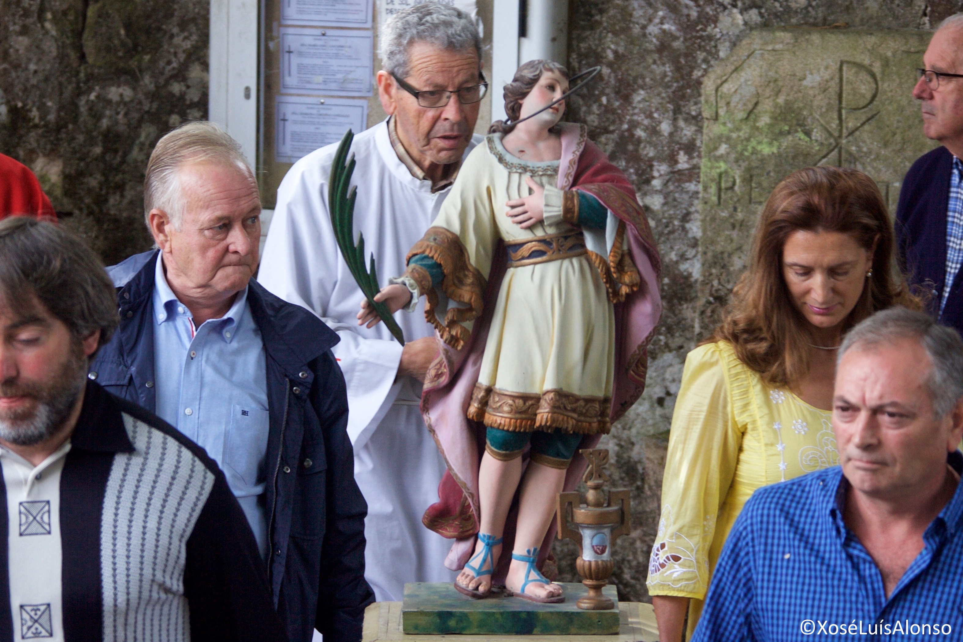 Imaxen procesional.